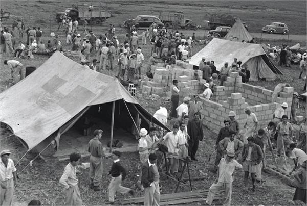 "יקום" - ביום העליה